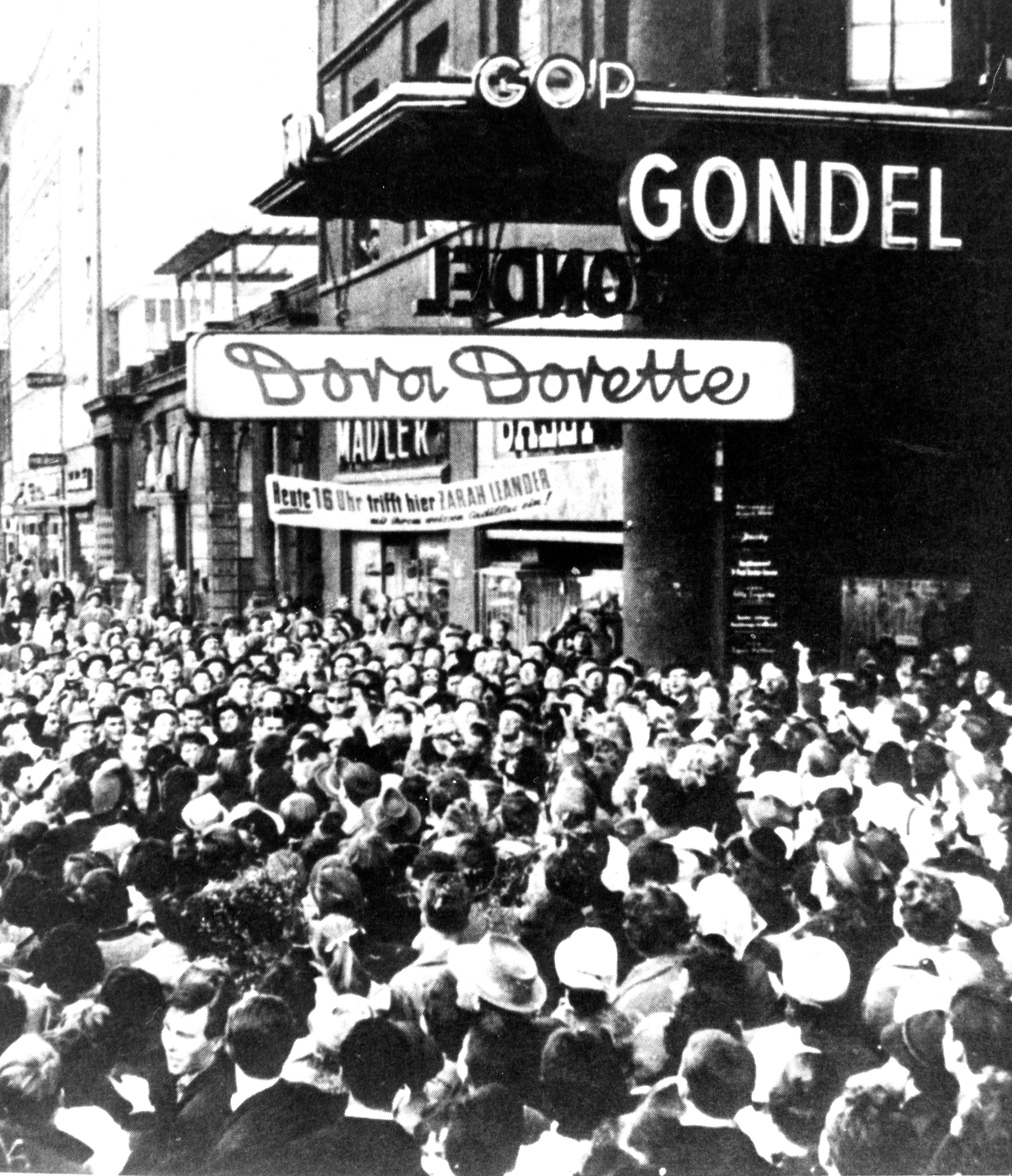 historisch